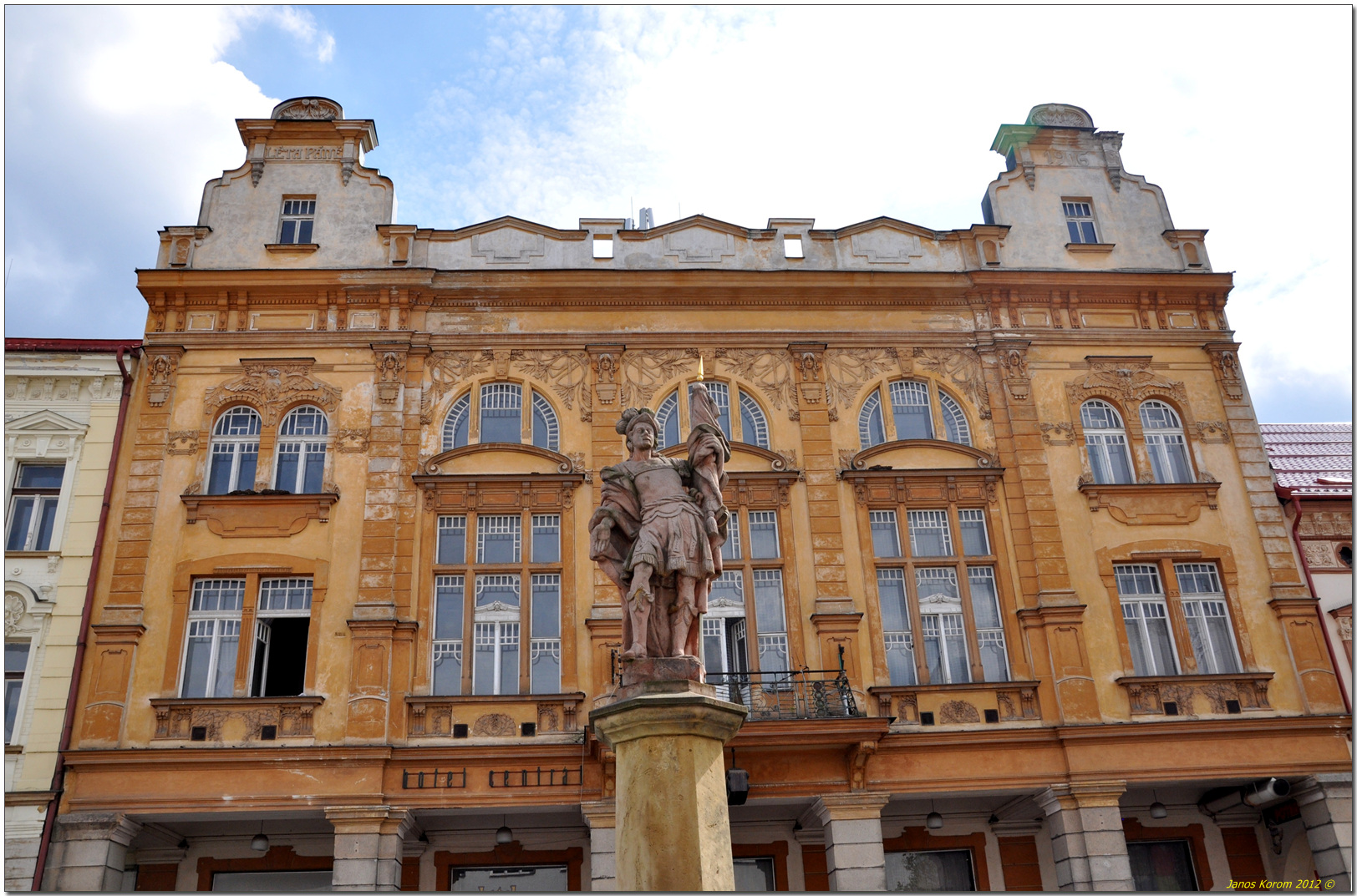 Kašna se sochou sv. Floriána stojící před dnes již nefungujícím hotelem Centrál.